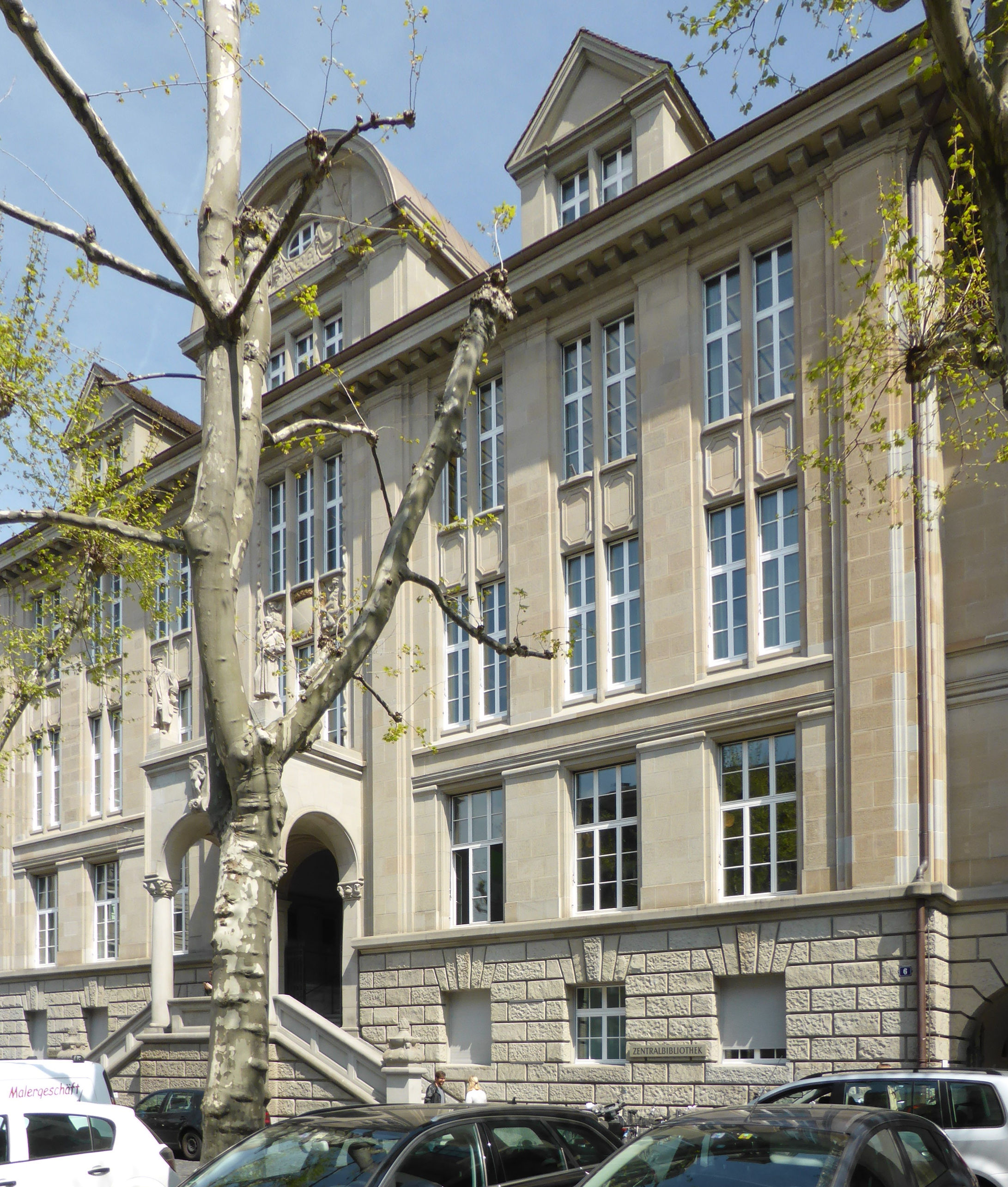 Zentralbibliothek Zürich, Zähringerplatz 6, 8001 Zürich (Stadt-, Kantons- und Universitätsbibliothek), gegründet 1914, eröffnet 1917